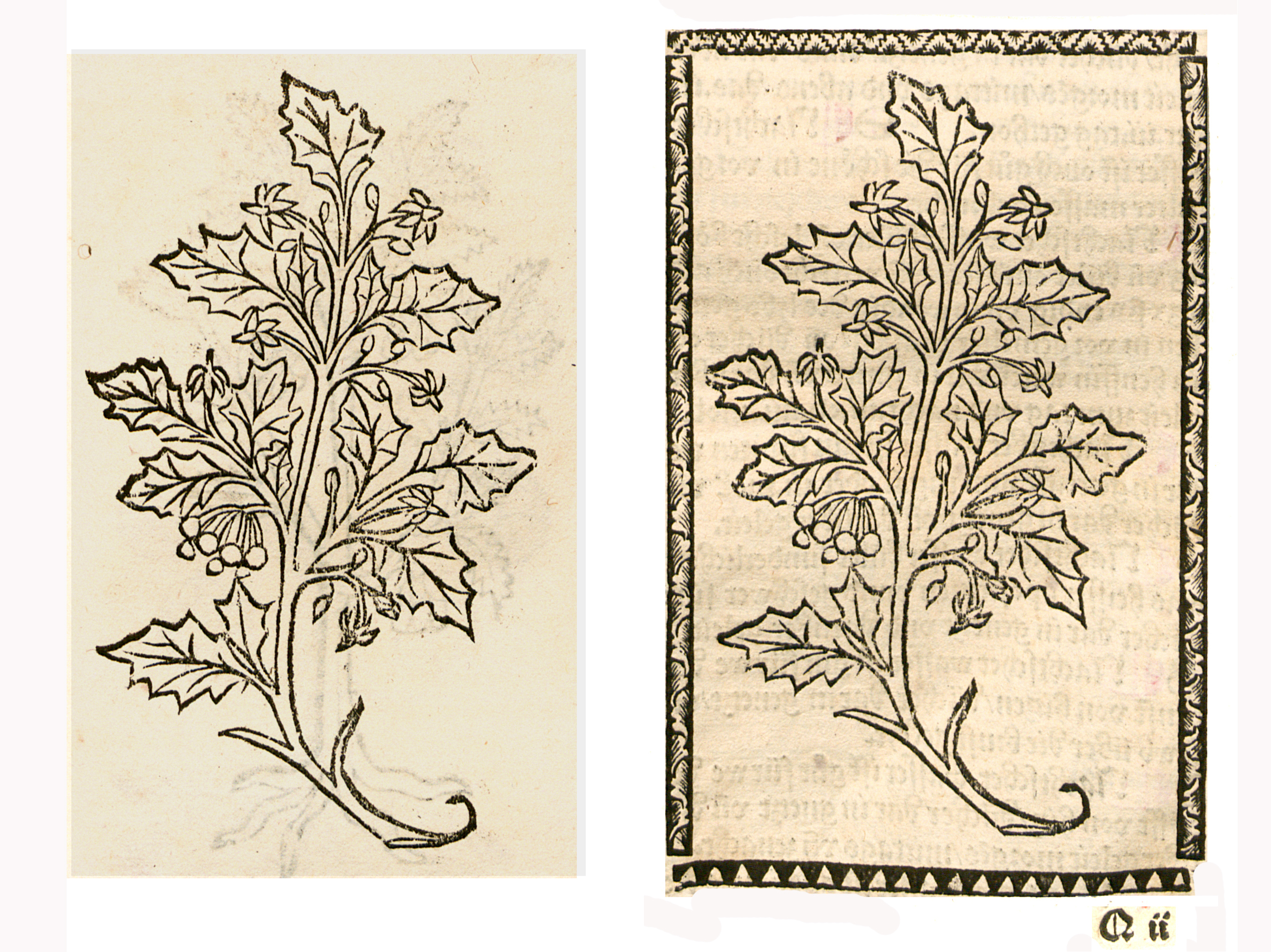 Abbildung von: Nachtschet (Solanum nigrum)